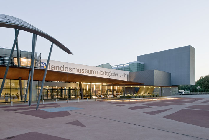 Landesmuseum Niederösterreich, Eingangsseite